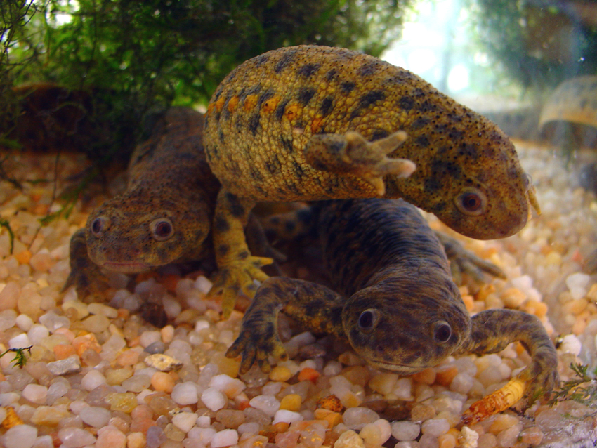 Trio de Pleurodeles de Waltl.